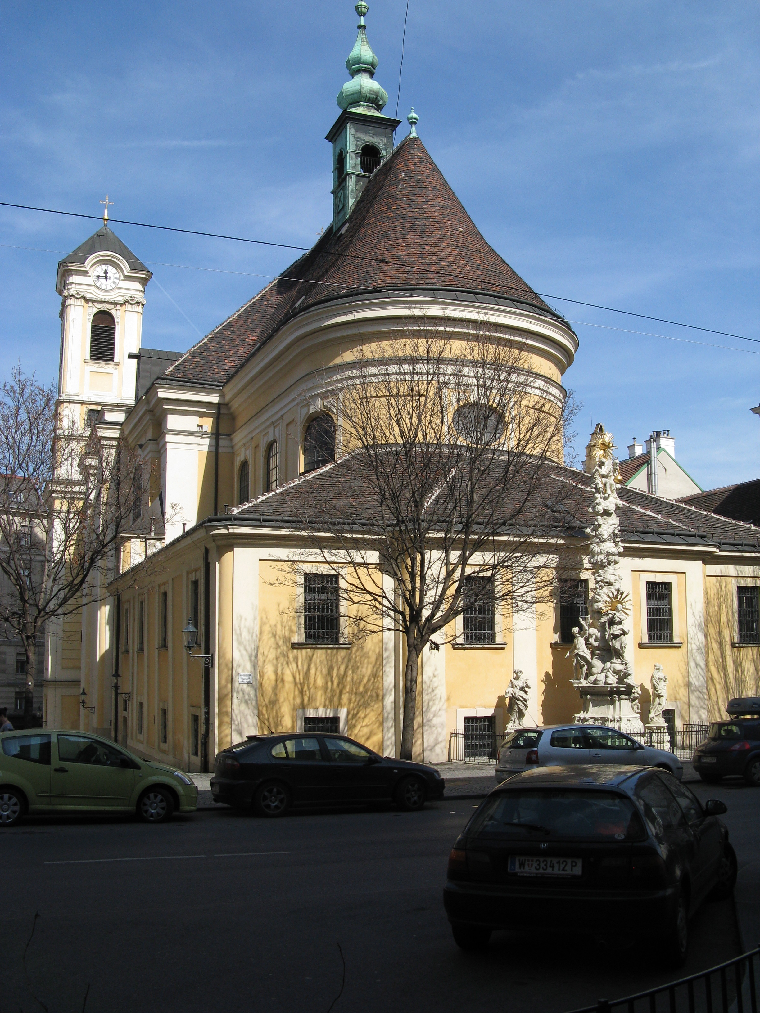 kirche Sankt Ulrich (Wien).